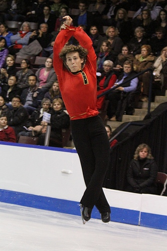 Адам Риппон на 2011 Skate Canada International. Прыжок с двумя поднятыми руками.